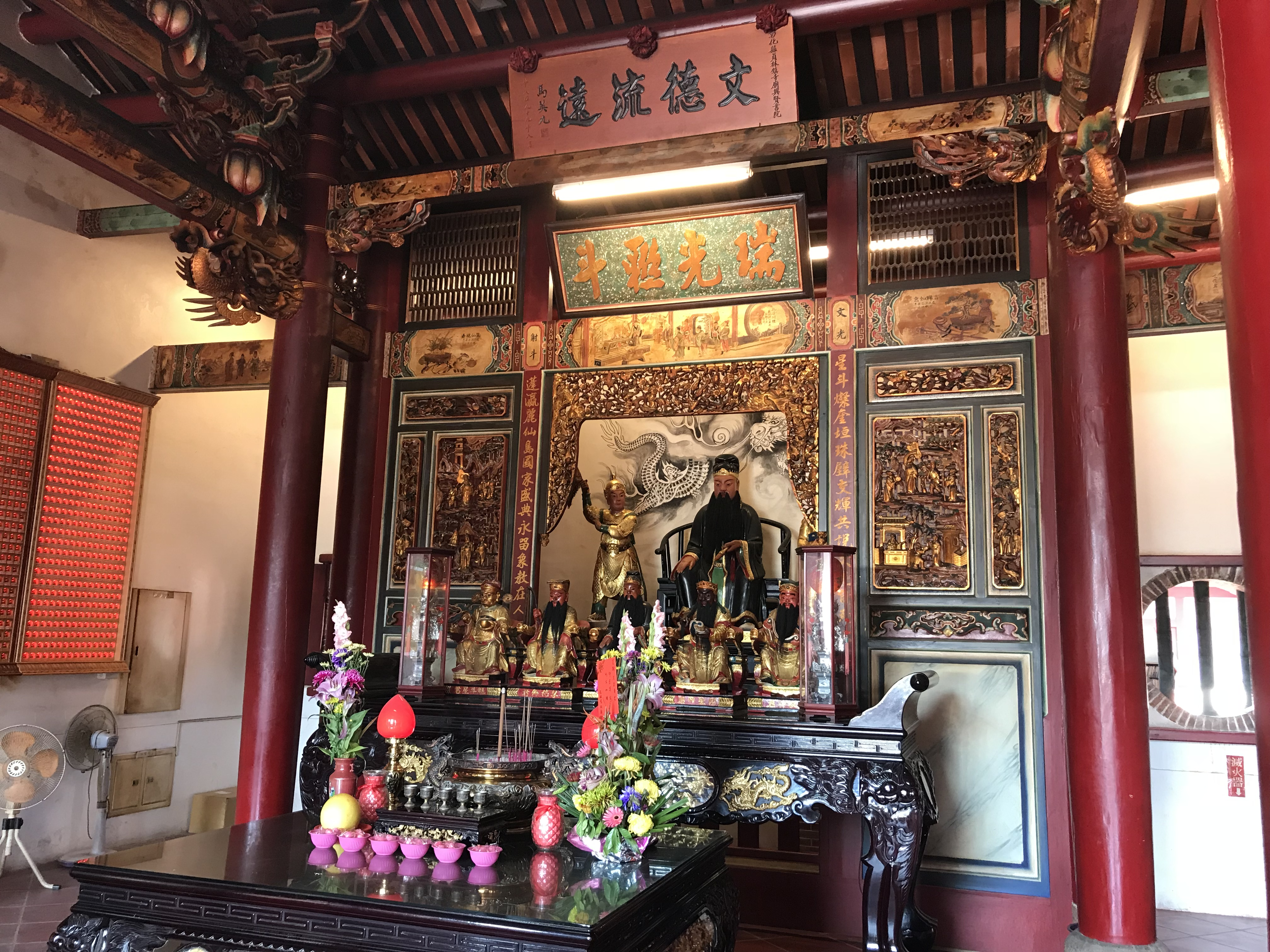 興賢書院正殿內